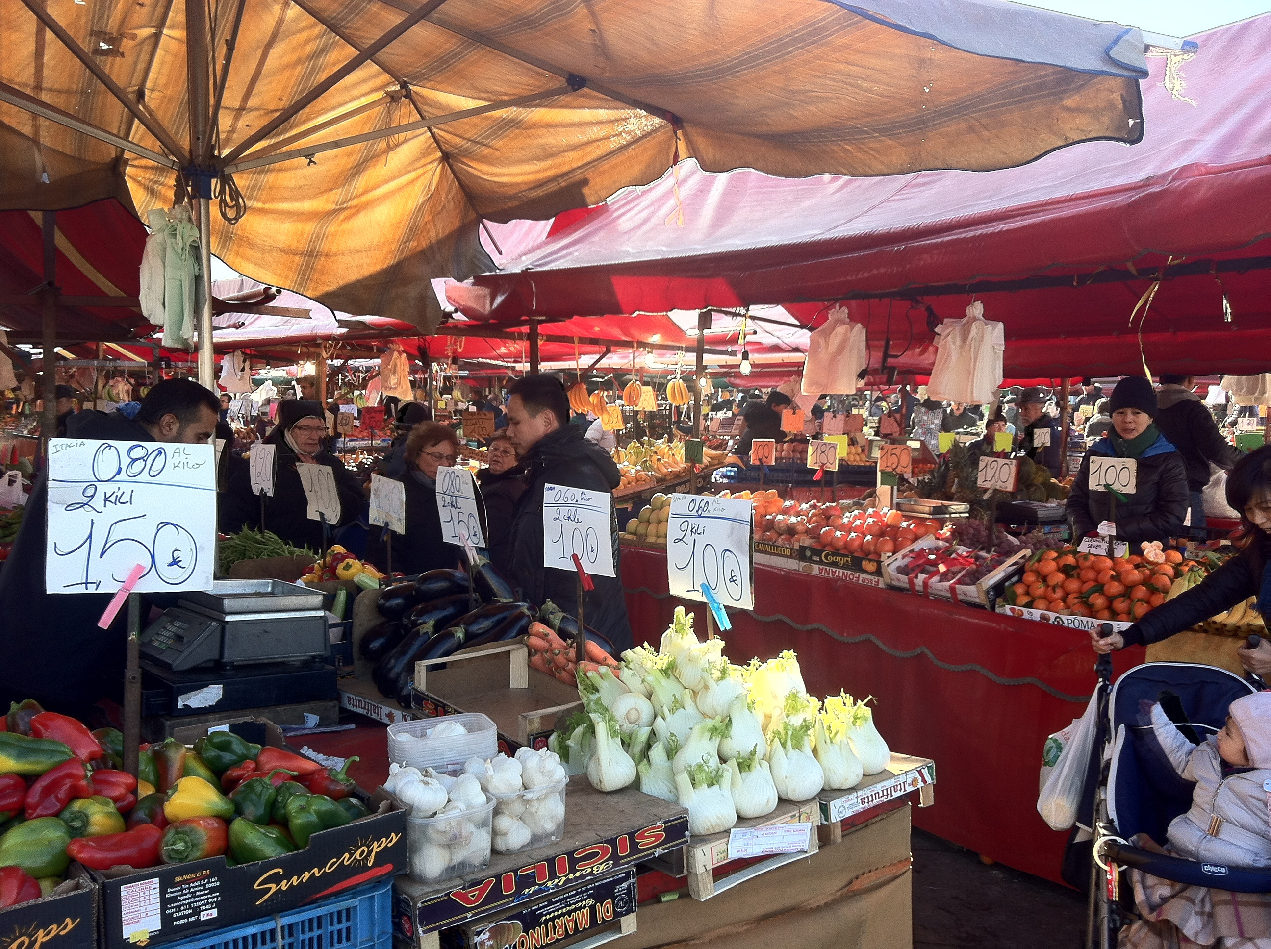 Porta palazzo Market of Fresh Fruits and Vegetables, Mercato alimentare di Porta palazzo Contrattazione